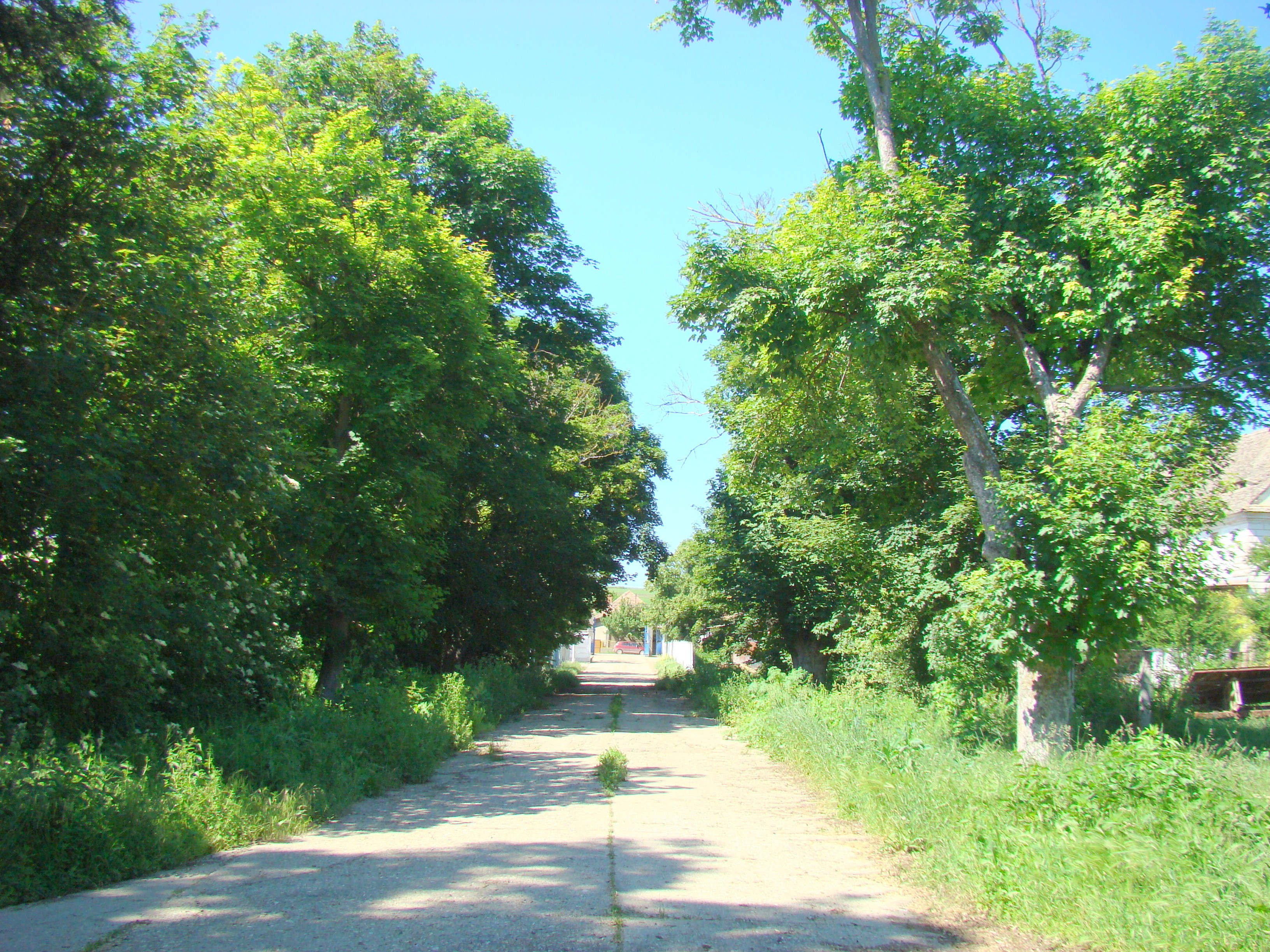 Parc, sat Sânmiclăuș; comuna Șona 03